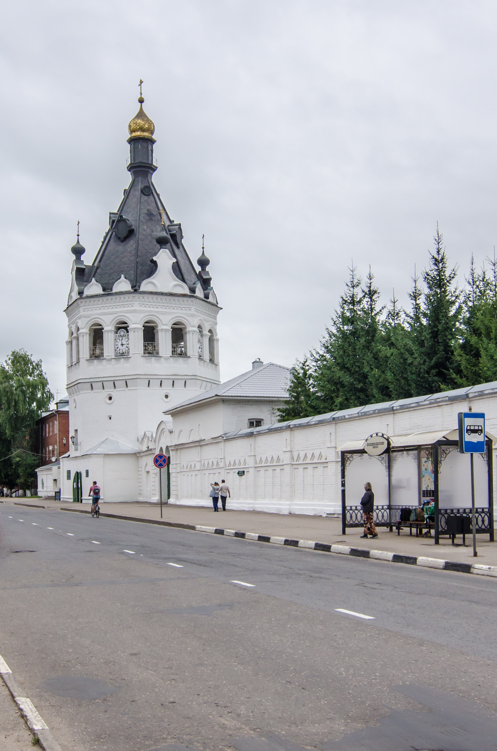 Колокольня: улица Симановского, 26-е, Кострома, Костромская область